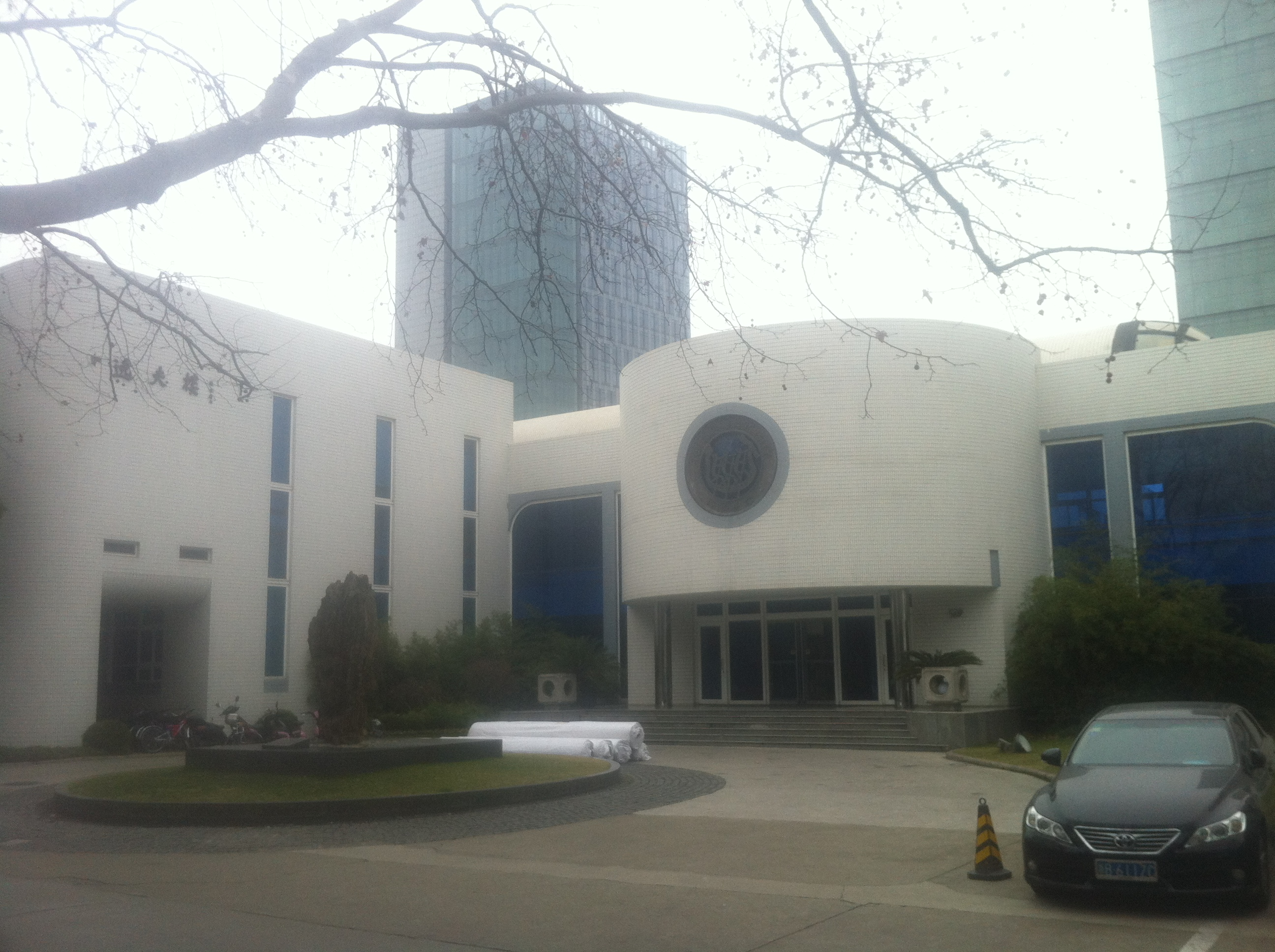 同济大学逸夫楼